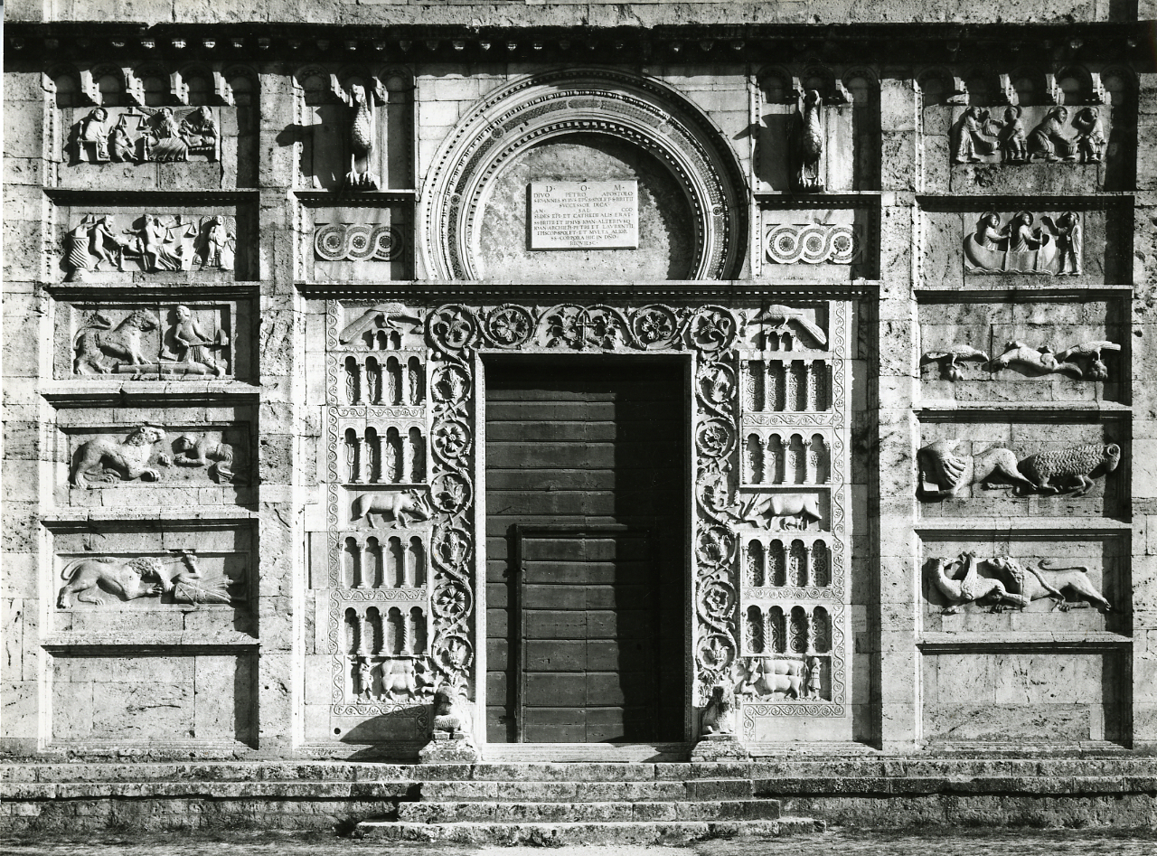 Serie fotografica : Spoleto, 1967 / Paolo Monti. - Stampe: 8 : Positivo b/n, gelatina bromuro d'argento/ carta, 24x30. - ((Al verso delle stampe manoscritto numero di negativo corrispondente: 473/13, 473/32, 474/37, 1389, 13896. Sul coperchio della scatola, manoscritto a pennarello: "Abruzzi, Marche, Umbria". - Occasione: Documentazione per la pubblicazione: Umbria, TOURING CLUB ITALIANO, Milano, 1969. - Fonte: Agenda di Paolo Monti: Monti/ 3 aprile 1966 - 9 marzo 1971/ 12421-16823 (1966-1971), presso Archivio Paolo Monti